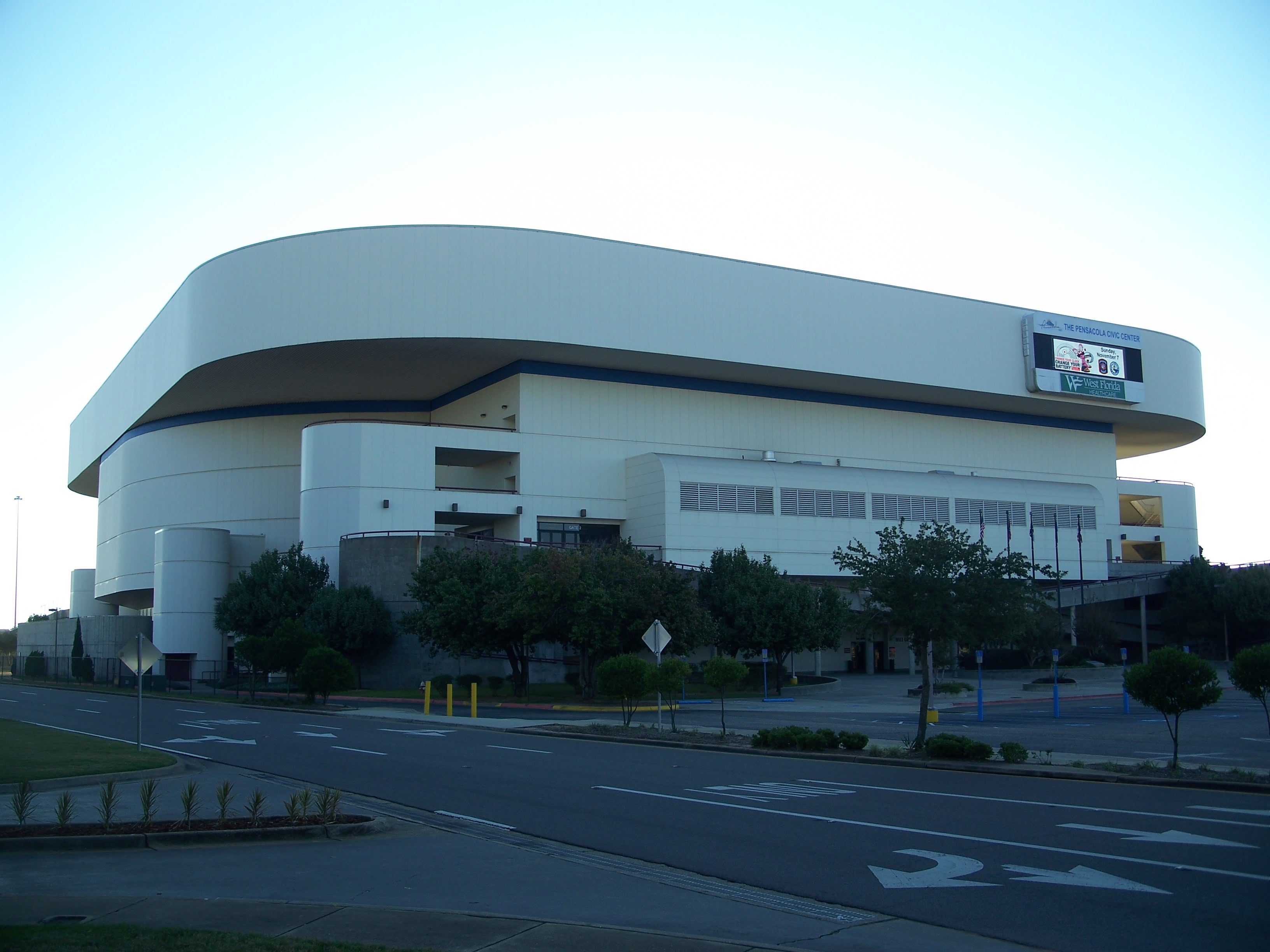 Pensacola, Florida: Civic center